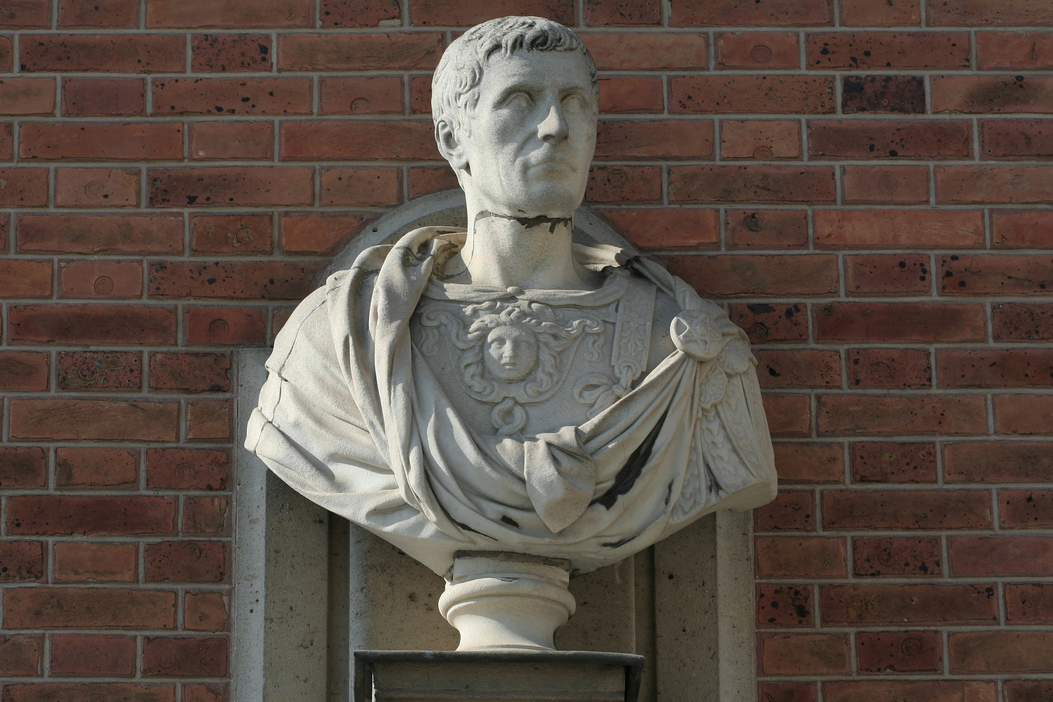 Château de Versailles, cour de marbre. Buste de Jules César. Numéro d'inventaire : Vdse 126